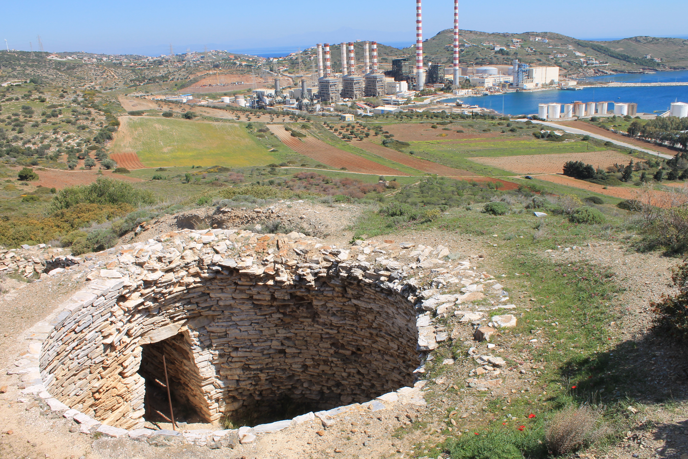 Θορικός, μυκηναϊκός τάφος υστεροελλαδικής περιόδου«άγνωστο»